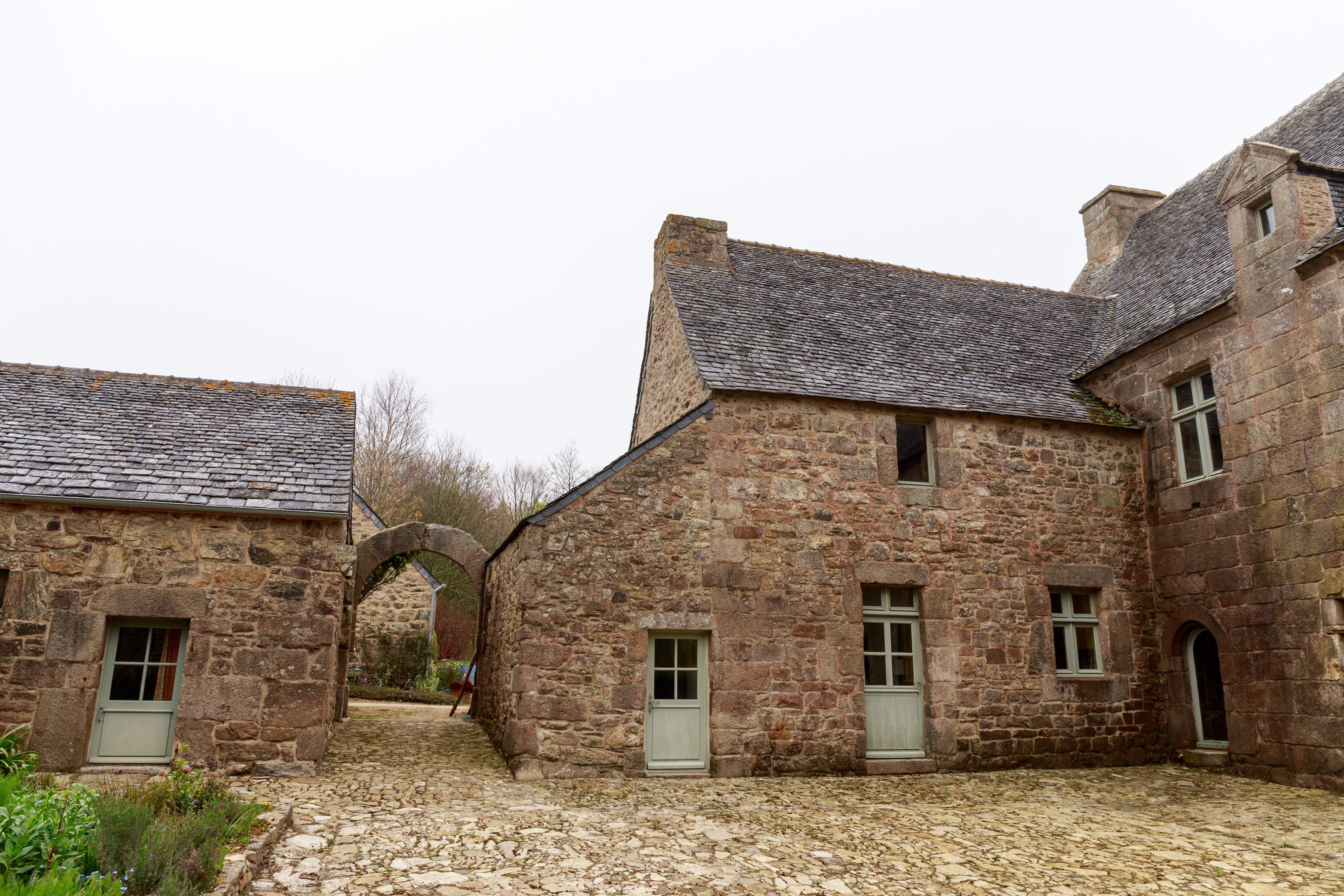 Manoir de Creac'h-Ingar (16e siècle) à Tréflaouénan. La partie ancienne, de plan en L, comprend un escalier en granit à volée droite.